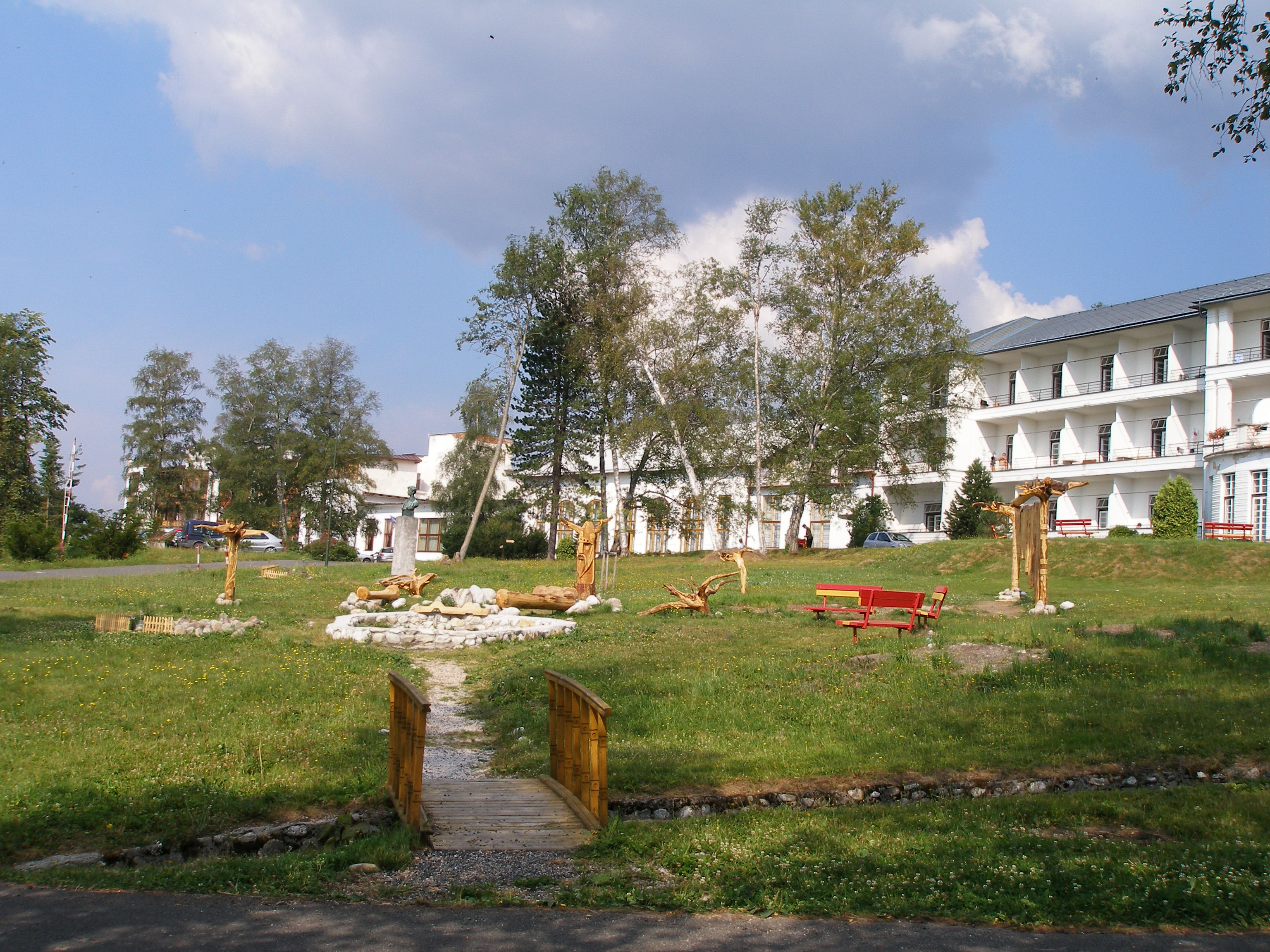 Osada Tatranská Polianka, Slovakia